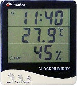 Termohigrômetro